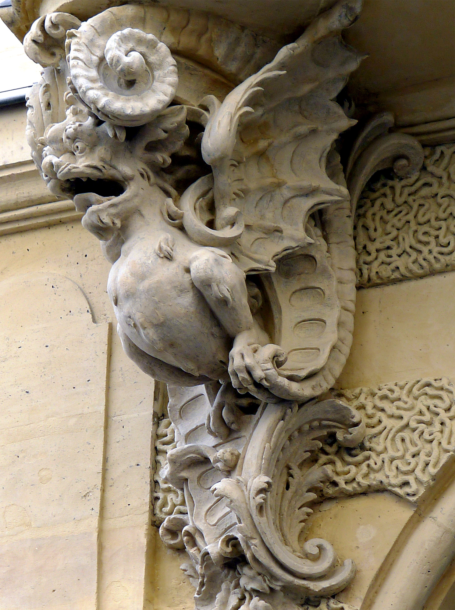 Hôtel de Chenizot (chimère de la porte d'entrée) - 51 rue Saint-Louis-en l'ïle - Paris IV .